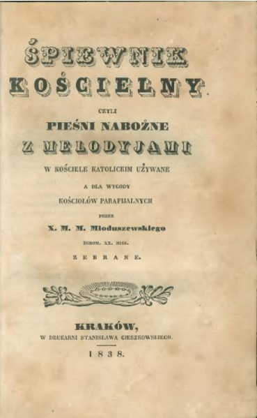 screenshot of scanned title page of 1838 church hymnal